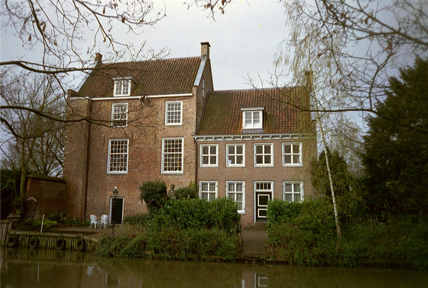 De Beesde of "Cammingha", Camminghalaan 36, Bunnik. Op de voorgrond de Kromme Rijn. Foto genomen op 11 april 2004 en geupload door maker.